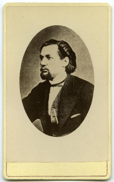 Der estnische Komponist Aleksander Saebelmann-Kunileid (1845-1875)